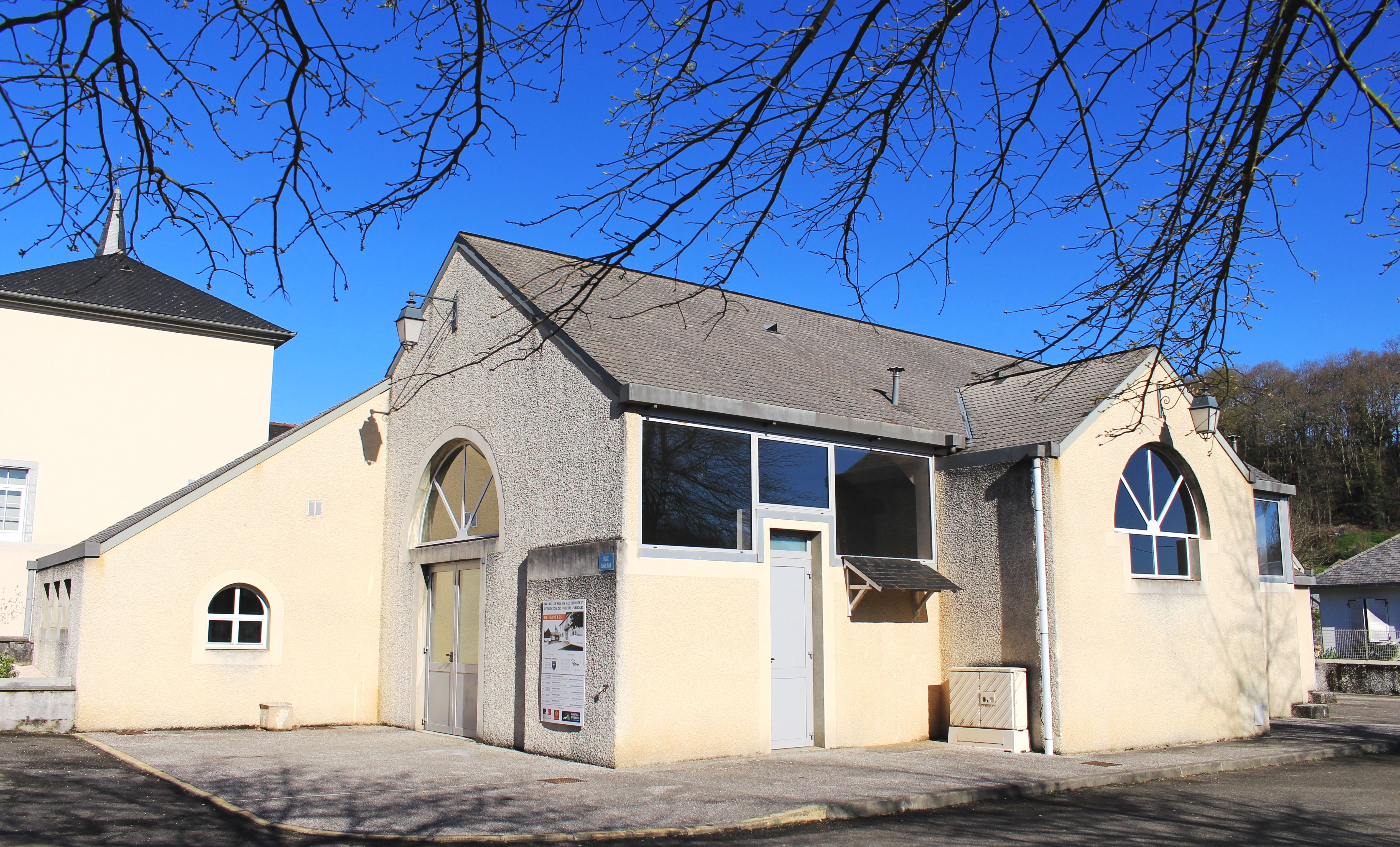 Salle des fêtes de Bartrès (Hautes-Pyrénées)